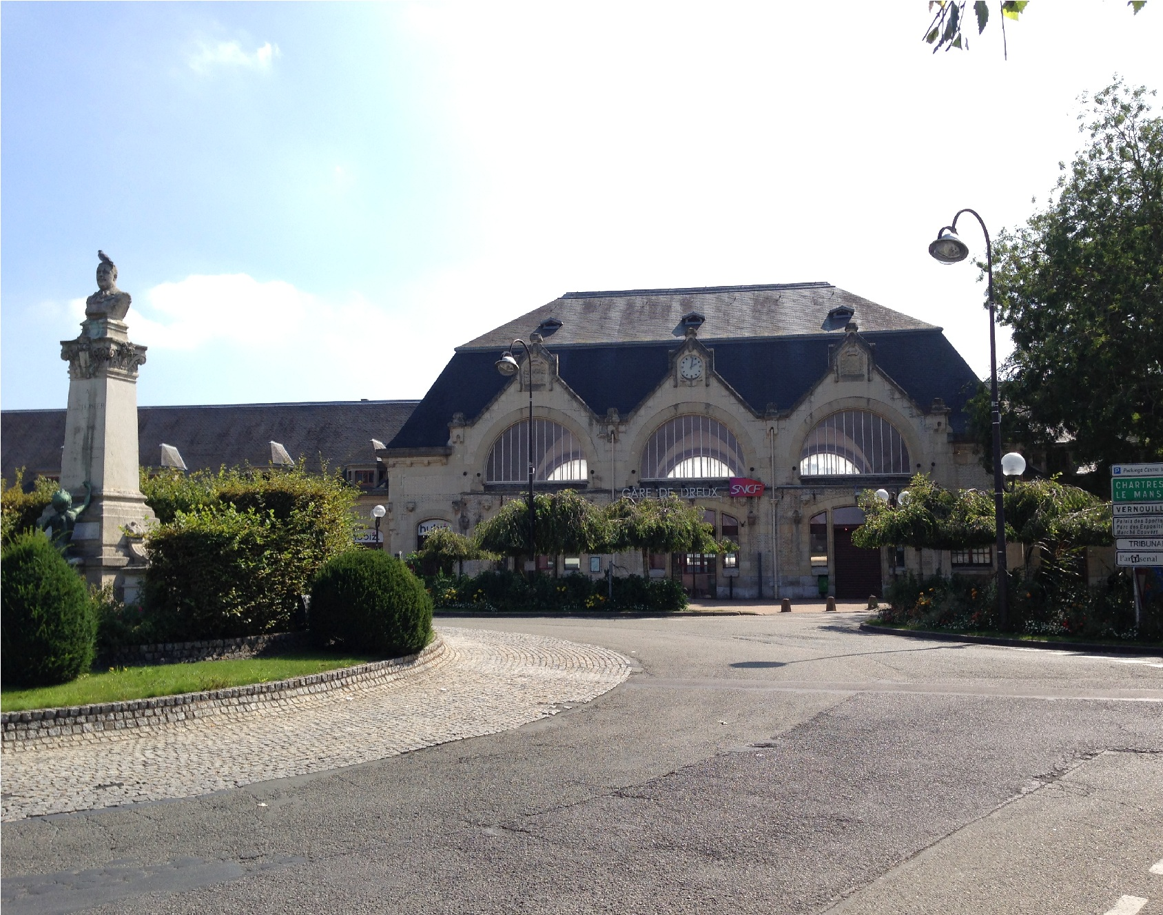 Gare de Dreux-2014